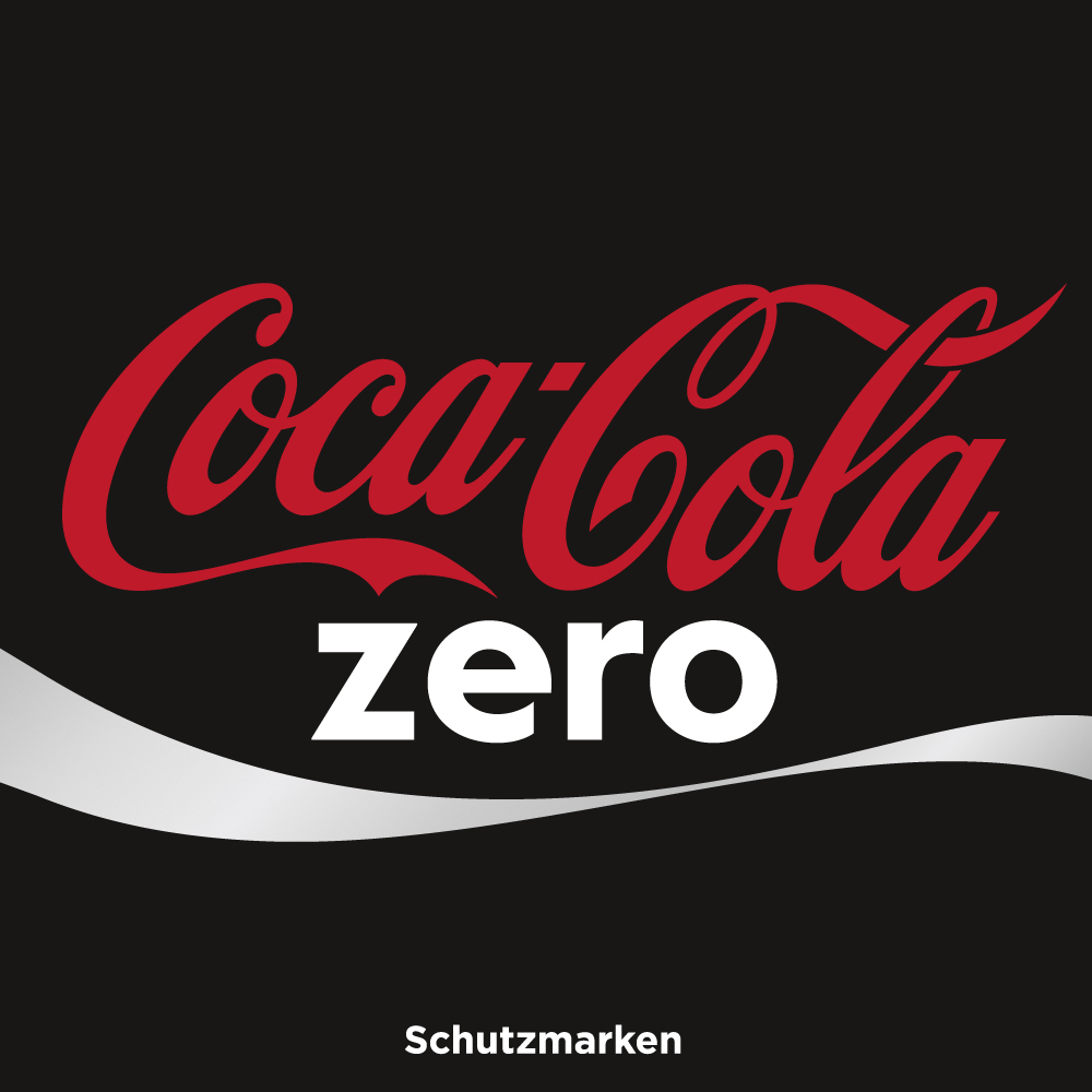 Logo der Coca Cola Version "Zero"